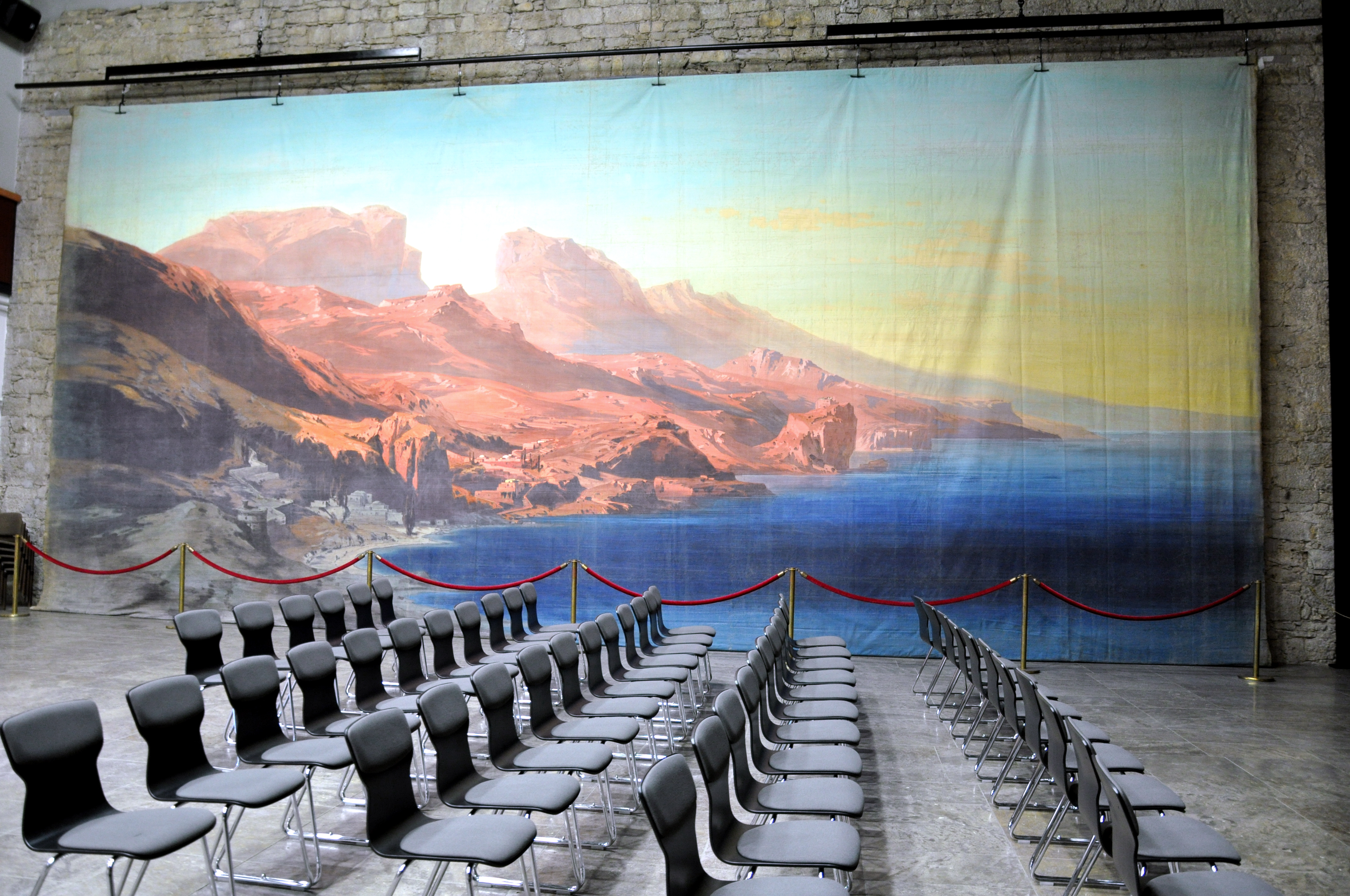 Meiningen, Theatermuseum, Kuliisse zu Shakespeares Wintermärchen